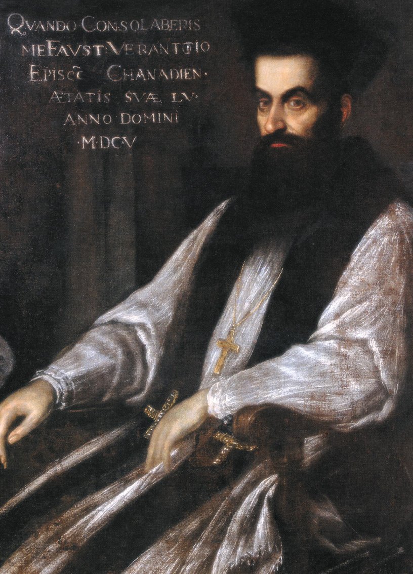 Retrato de Fausto Veranzio en 1605